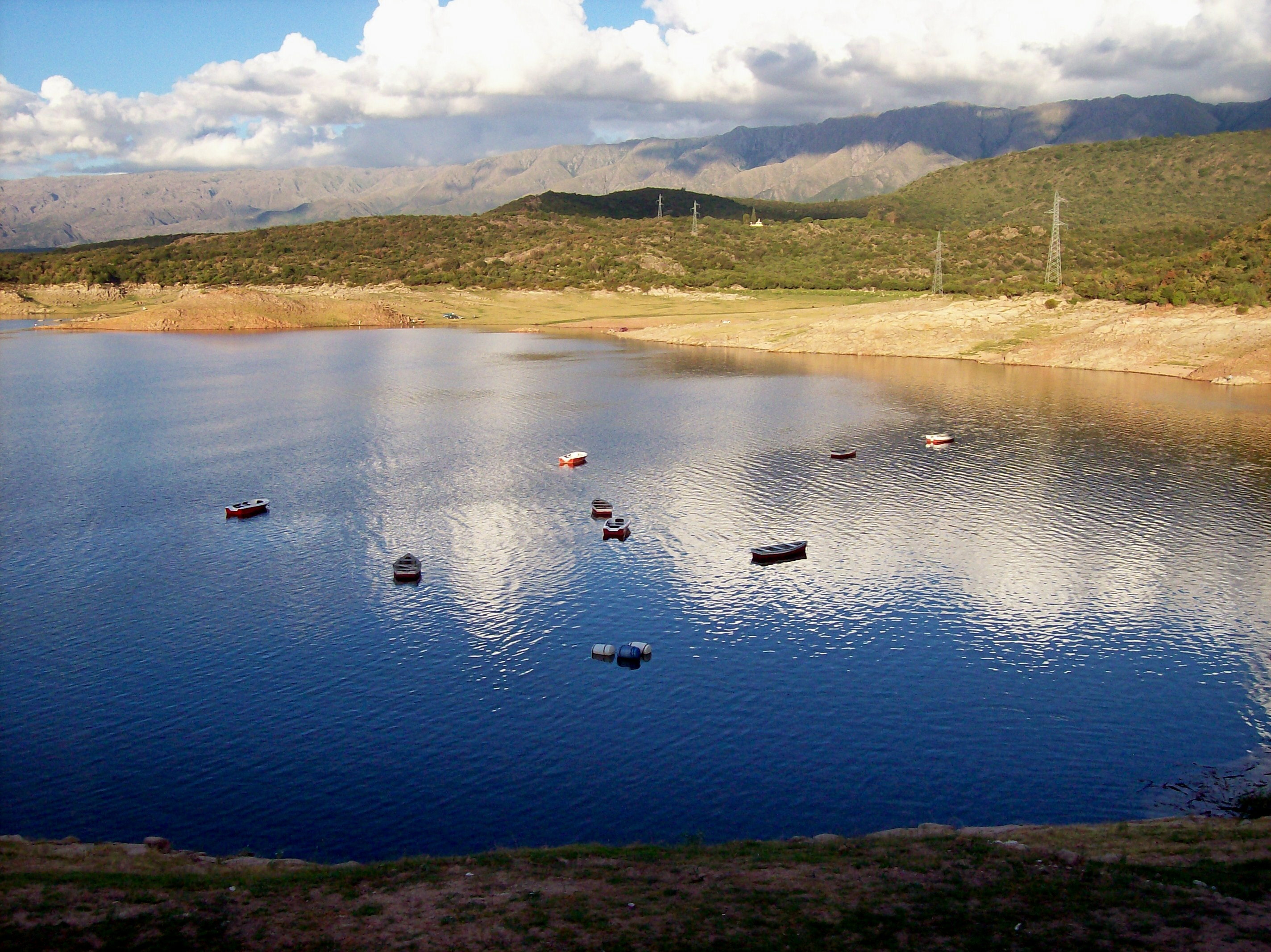 Dique La Viña, en el Río de los Sauces, Las Rabonas, provincia de Córdoba, Argentina.